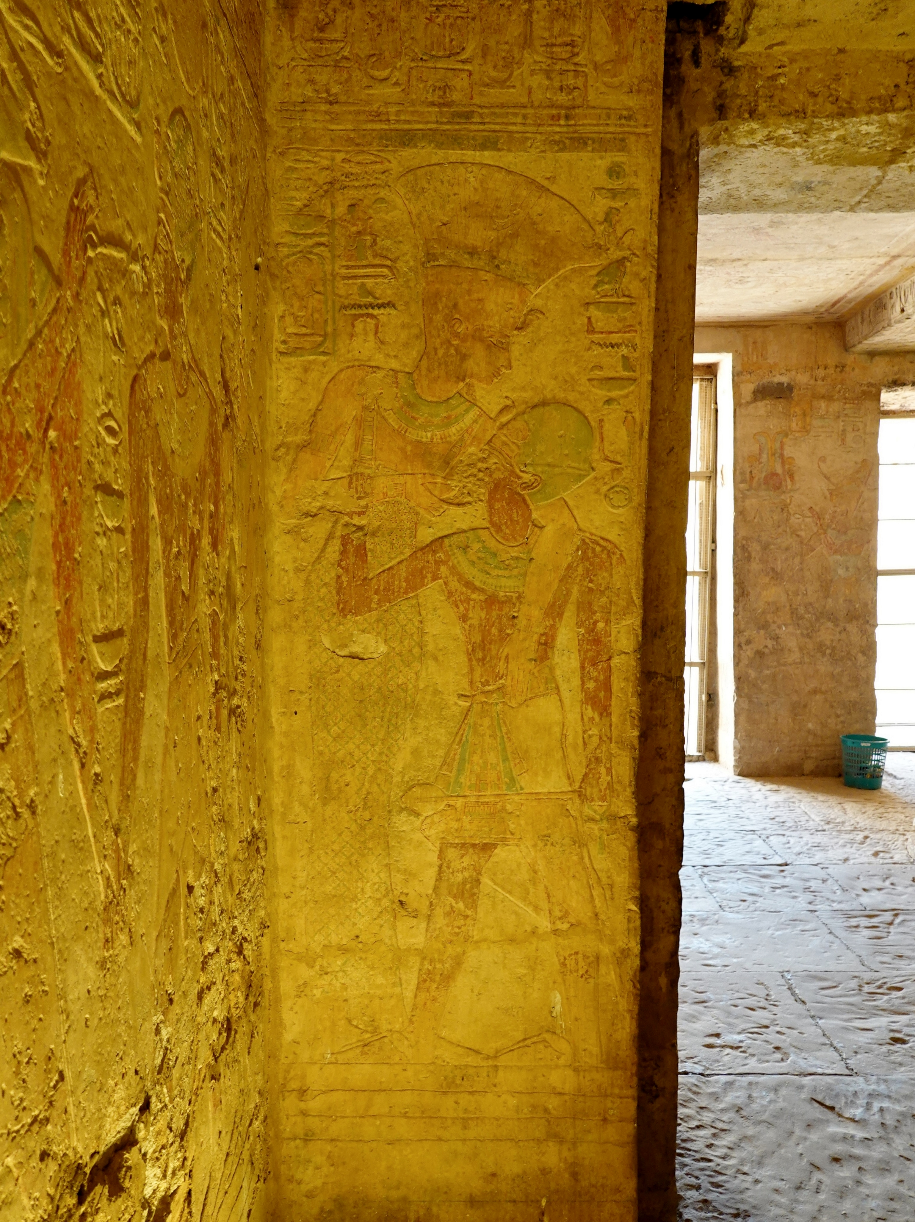 Innenraum des den Göttern Amun-Re, Re-Harachte, Chnum und Anukis geweihten Tempels Ramses’ II., ursprünglich aus Beit el-Wali, im Freilichtmuseum auf der Insel Neu-Kalabscha im Nassersee, Ägypten